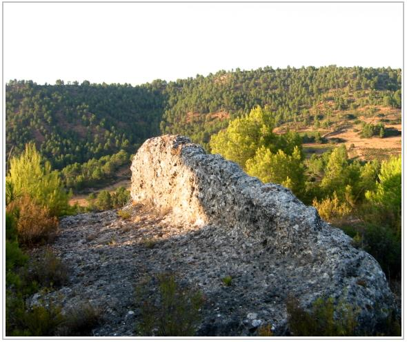 Yacimiento íbero de Los Castellares